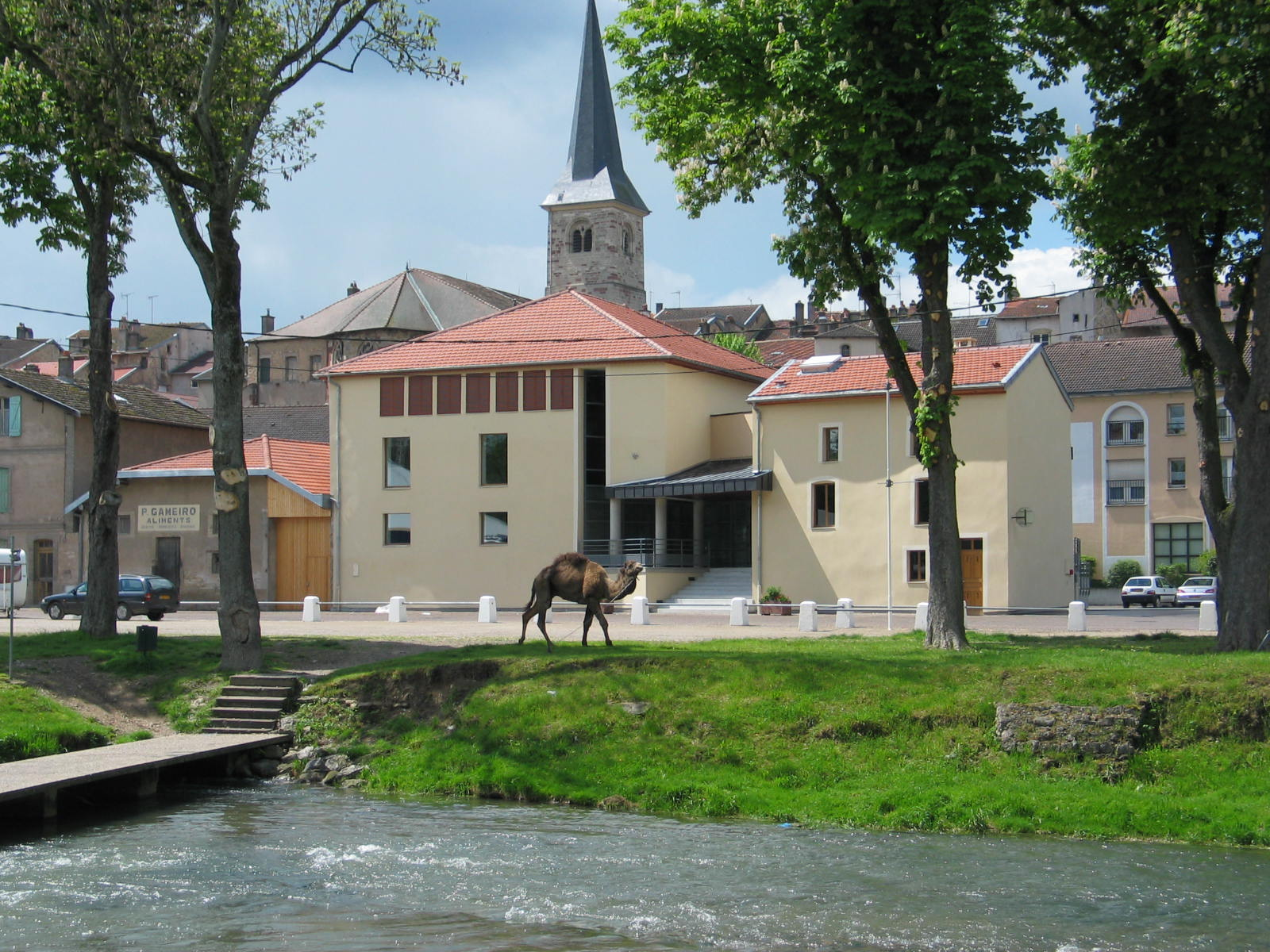 Vue sur la maison du plus grand violoncelle du monde à Mirecourt (France, département des Vosges)